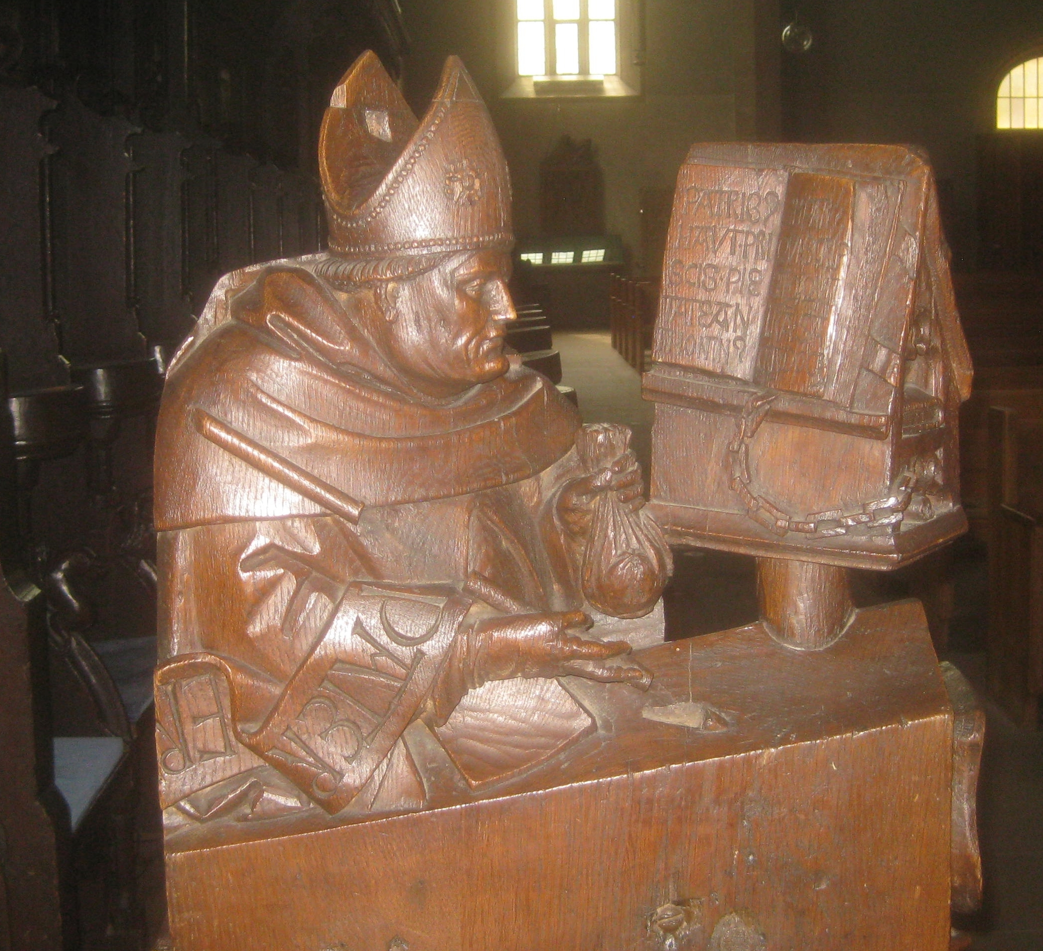 Chorgestühl der Leonhardskirche, linke Abschlusswange der vorderen Sitzreihe an der Südostfassade, Aufsatzbüste des Antoninus von Florenz.